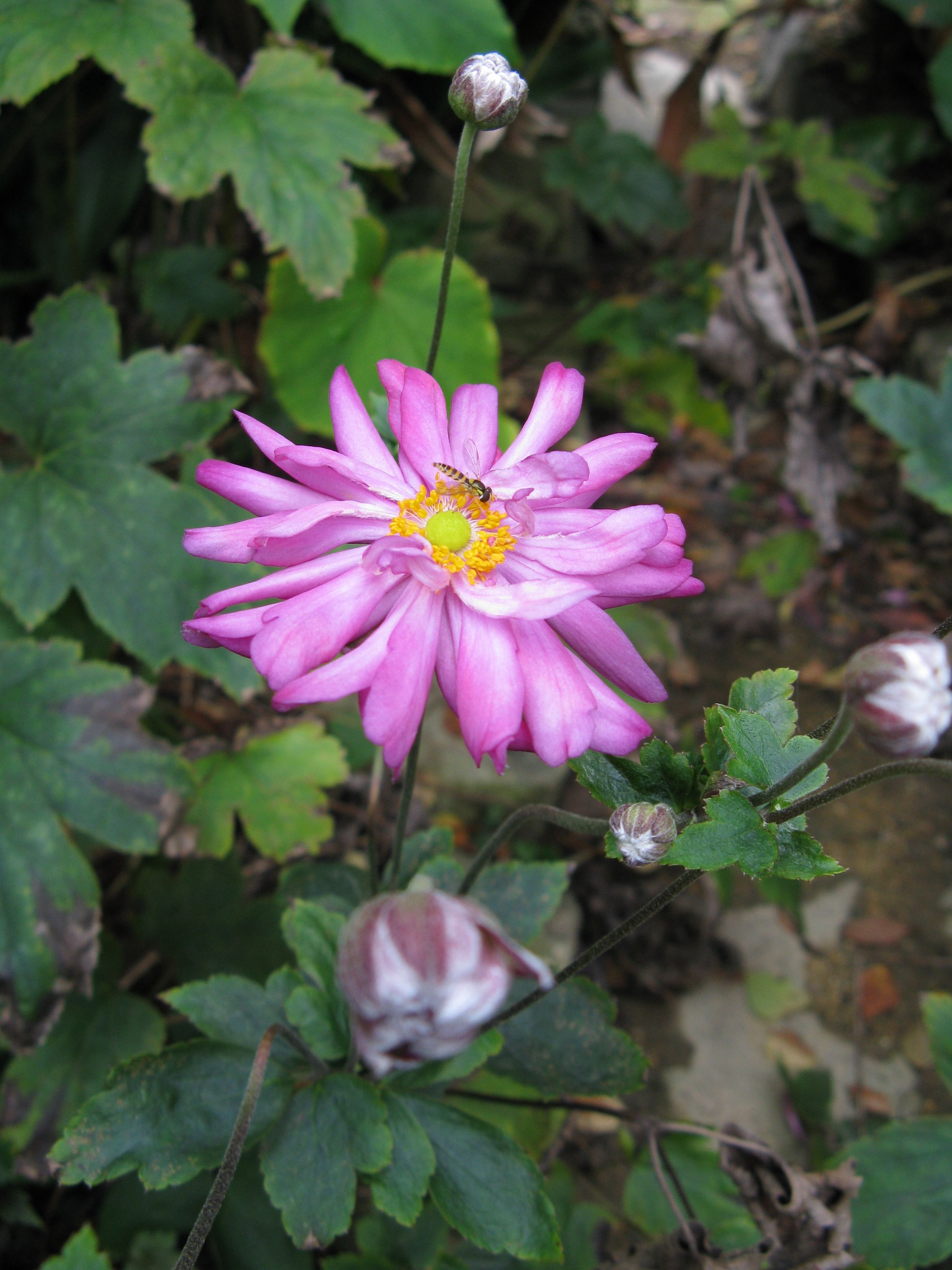 Anemone hupehensis var. japonica